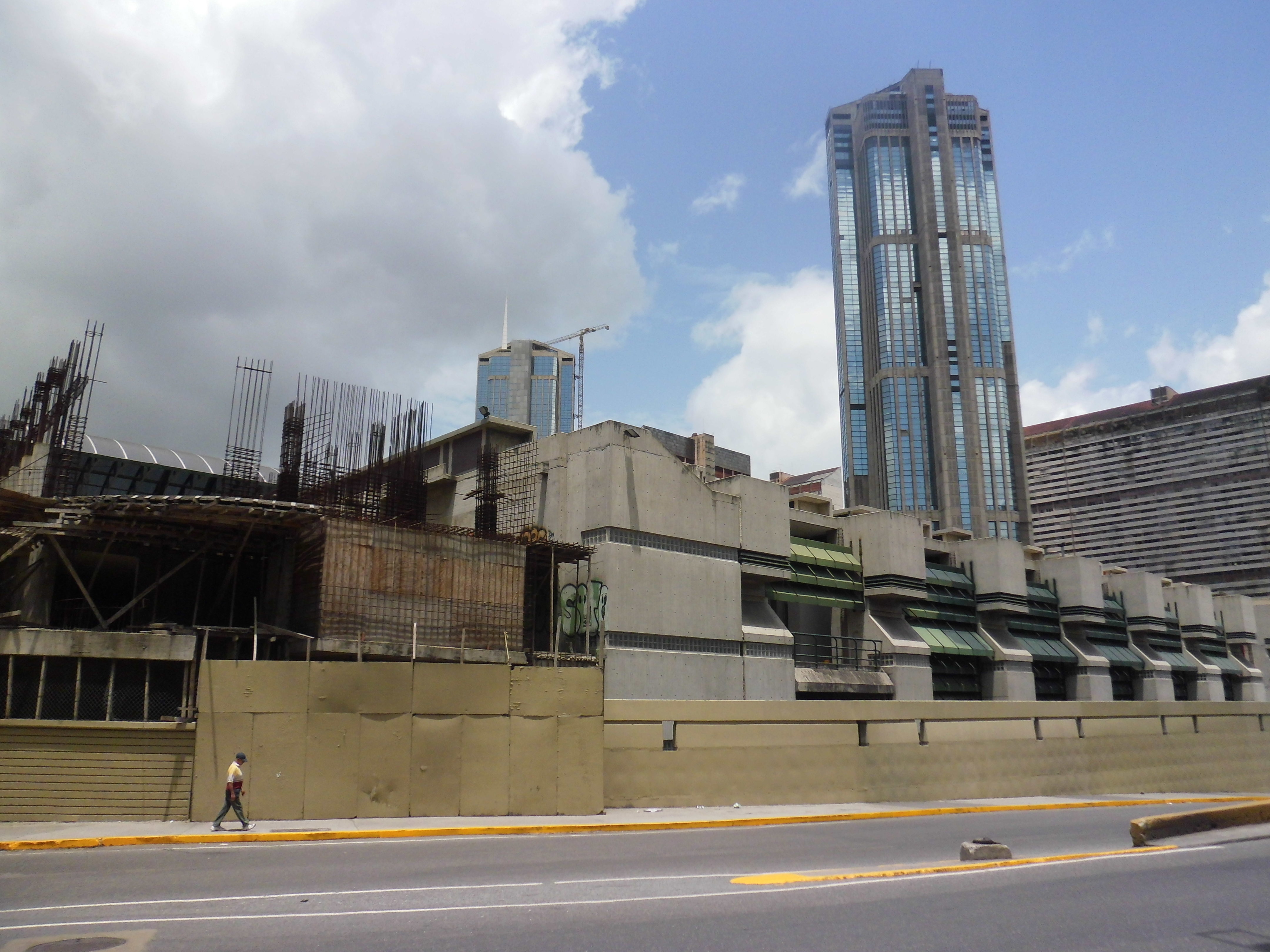 Galería de Arte Nacional, nueva sede desde abril del 2009, Caracas, Distrito Capital - Venezuela.